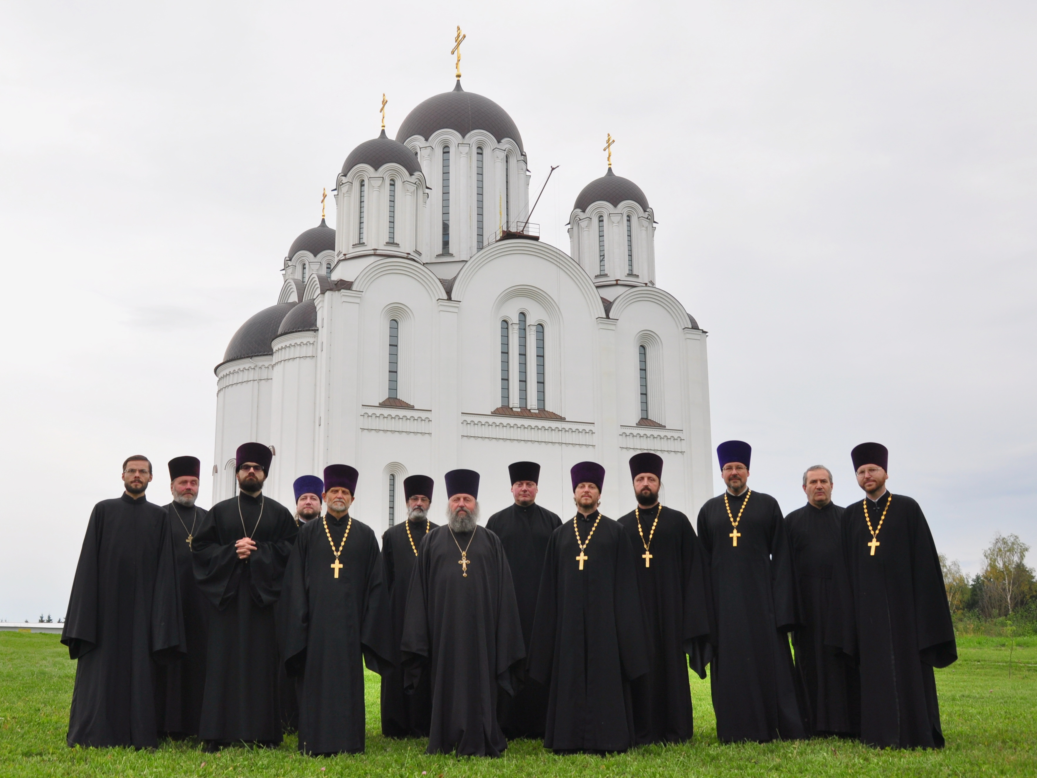 Клирики прихода: протодиакон Димитрий Романович, протоиерей Алексий Климов, иерей Сергий Пыск, протоиерей Виктор Мельников, протоиерей Владимир Шичко, протоиерей Евгений Юнес, настоятель — митрофорный протоиерей Игорь Коростелёв, протодиакон Ярослав Близнюк, протоиерей Павел Кивович, иерей Дионисий Коростелёв, протоиерей Виктор Якушев, диакон Валерий Лосик, протоиерей Александр Пронин